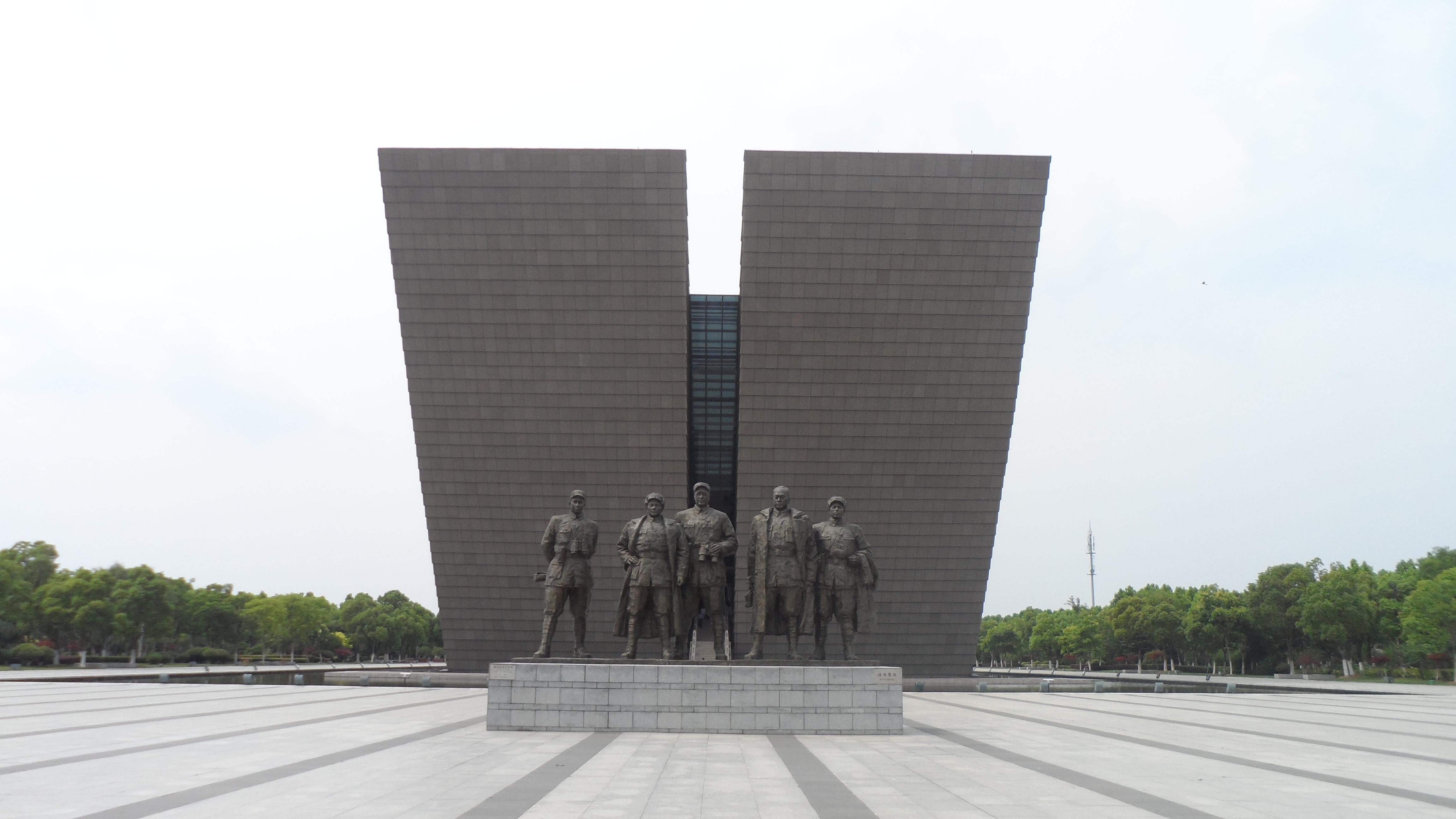 合肥渡江战役纪念馆